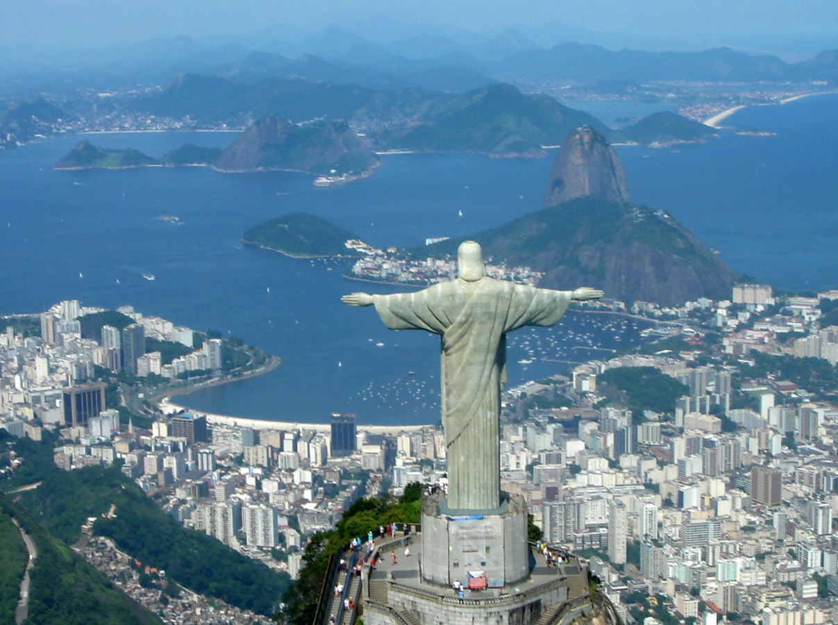 Panoram Cristo Redentor, Bahia de Guanabara, Pão de Açúcar e Botafogo, Rio de Janeiro, Brasil.